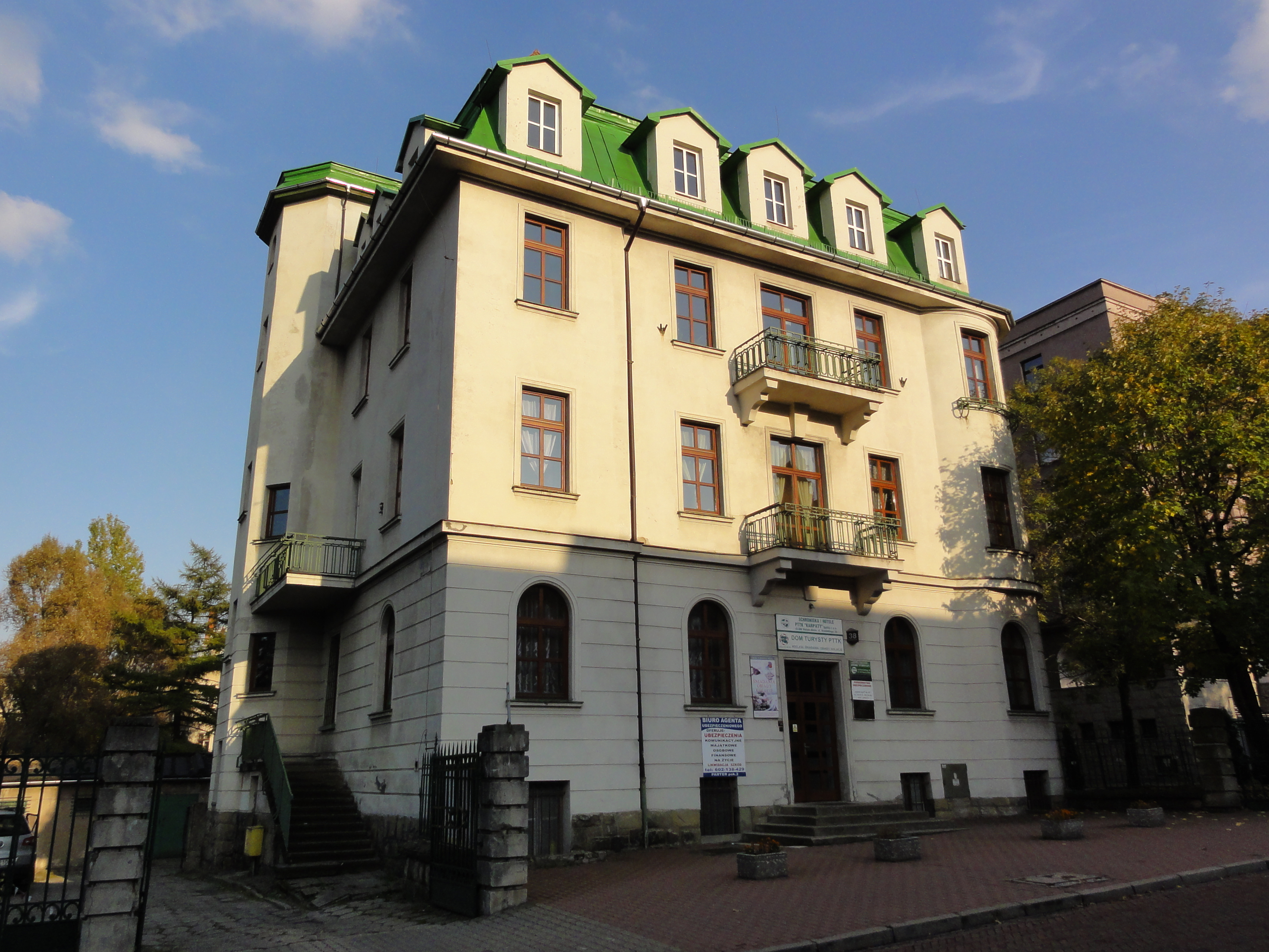 Bielsko-Biała, Krasińskiego, 38 Dom Turysty PTTK